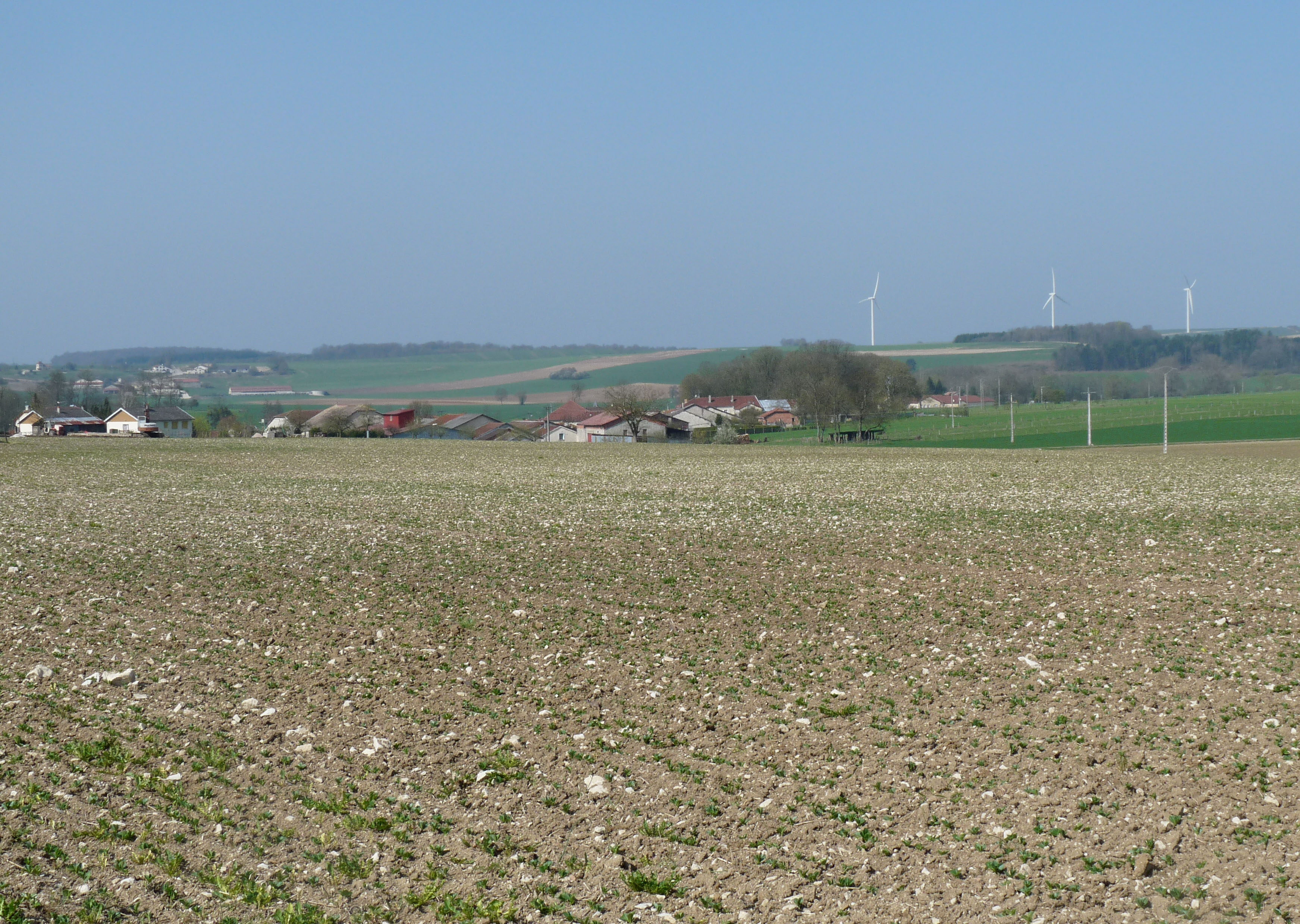 Echenay (Haute-Marne), entre terre calcaire et champ d'éoliennes